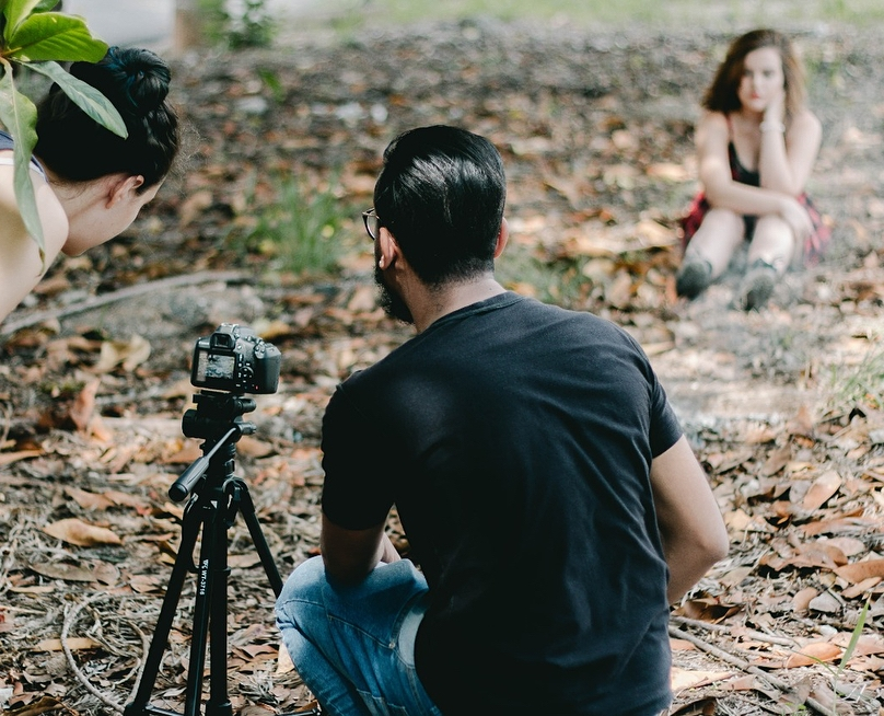 Gabriel Martins é um renomado diretor de vídeos e criador do podcast Lobotomia.